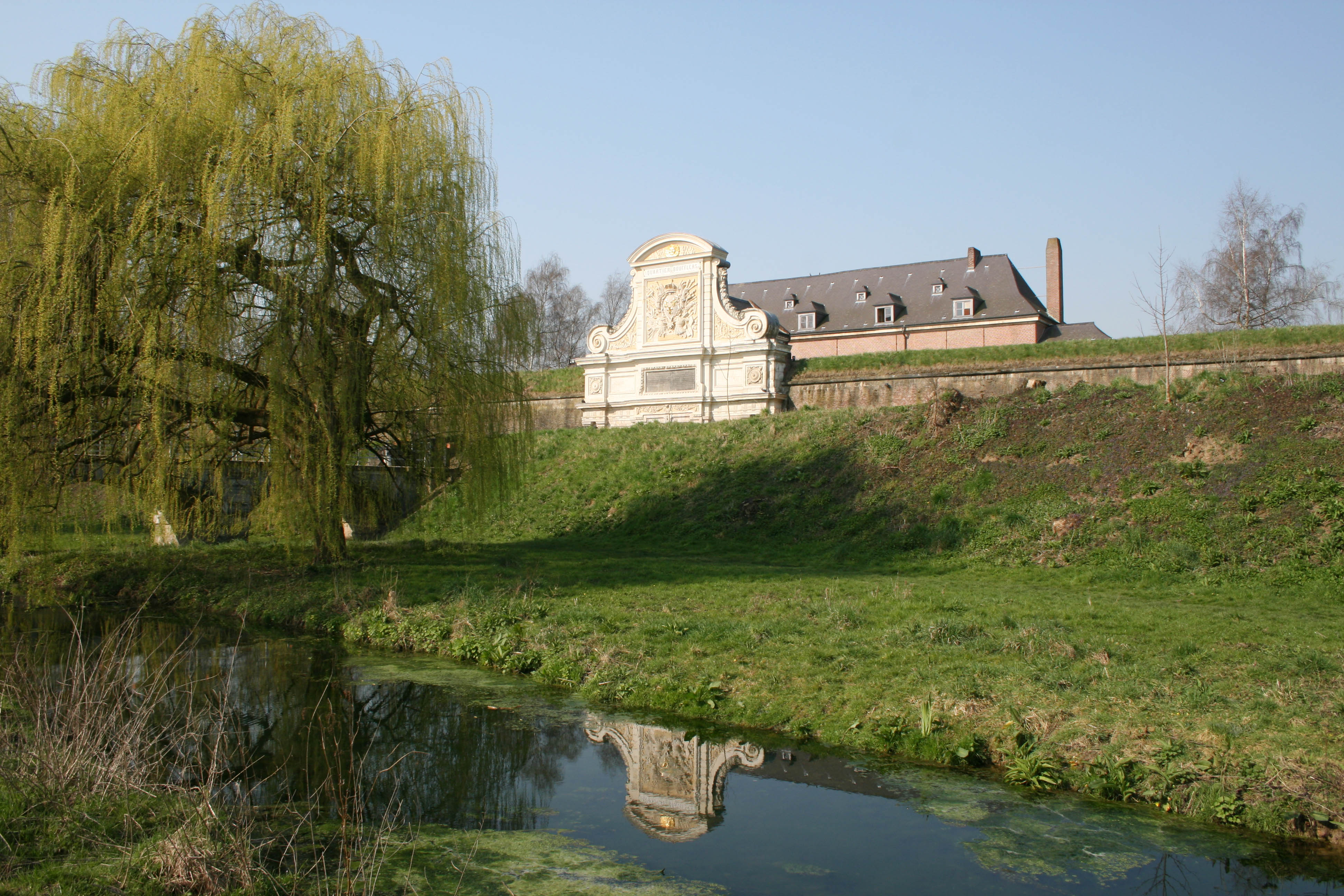 Caserne Boufflers dans la Citadelle Vauban à Lille